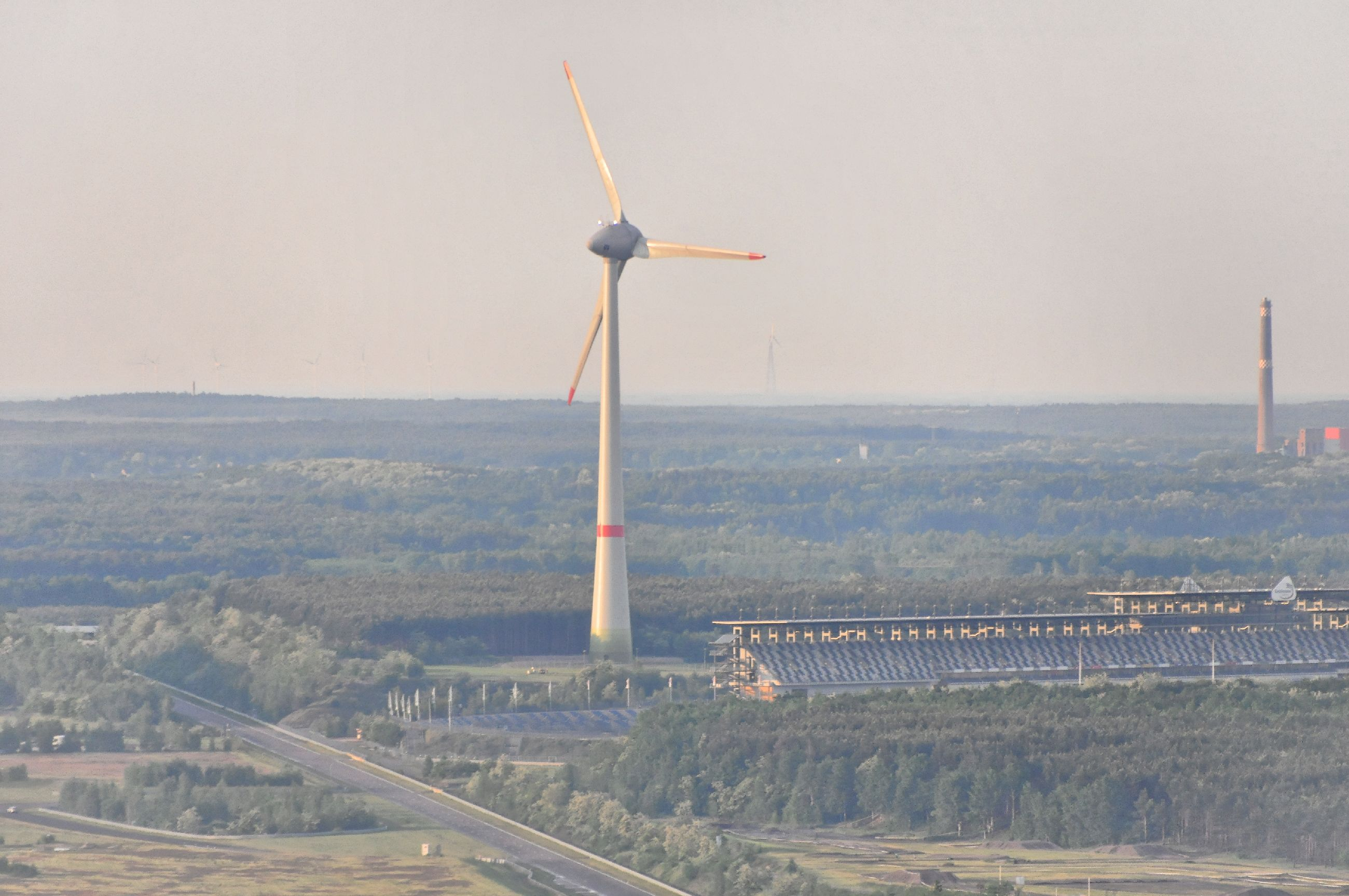 Windrad am Lausitzring; Luftbild; Überführungsflug vom Flugplatz Nordholz-Spieka über Lüneburg, Potsdam zum Flugplatz Schwarzheide-Schipkau